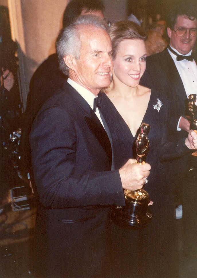 Le producteur de film Richard D. Zanuck et sa femme (depuis 1978) Lili Fini Zanuck, recevant un Oscar pour Miss Daisy et son chauffeur (Driving Miss Daisy) lors de la 62e cérémonie des Oscars du 26 mars 1990.